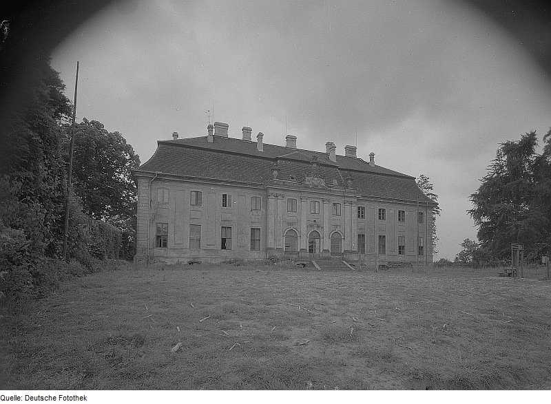 Original image description from the Deutsche Fotothek Marxwalde. Schloss Neuhardenberg